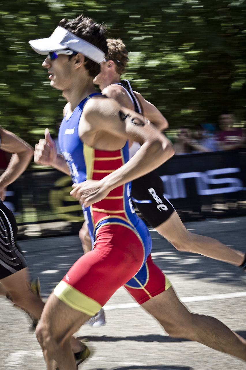 Mario Mola Madrid 2011